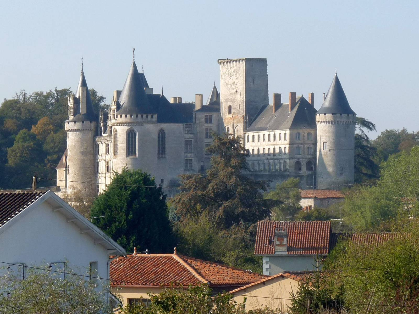 château de la Rochefoucauld (16), France